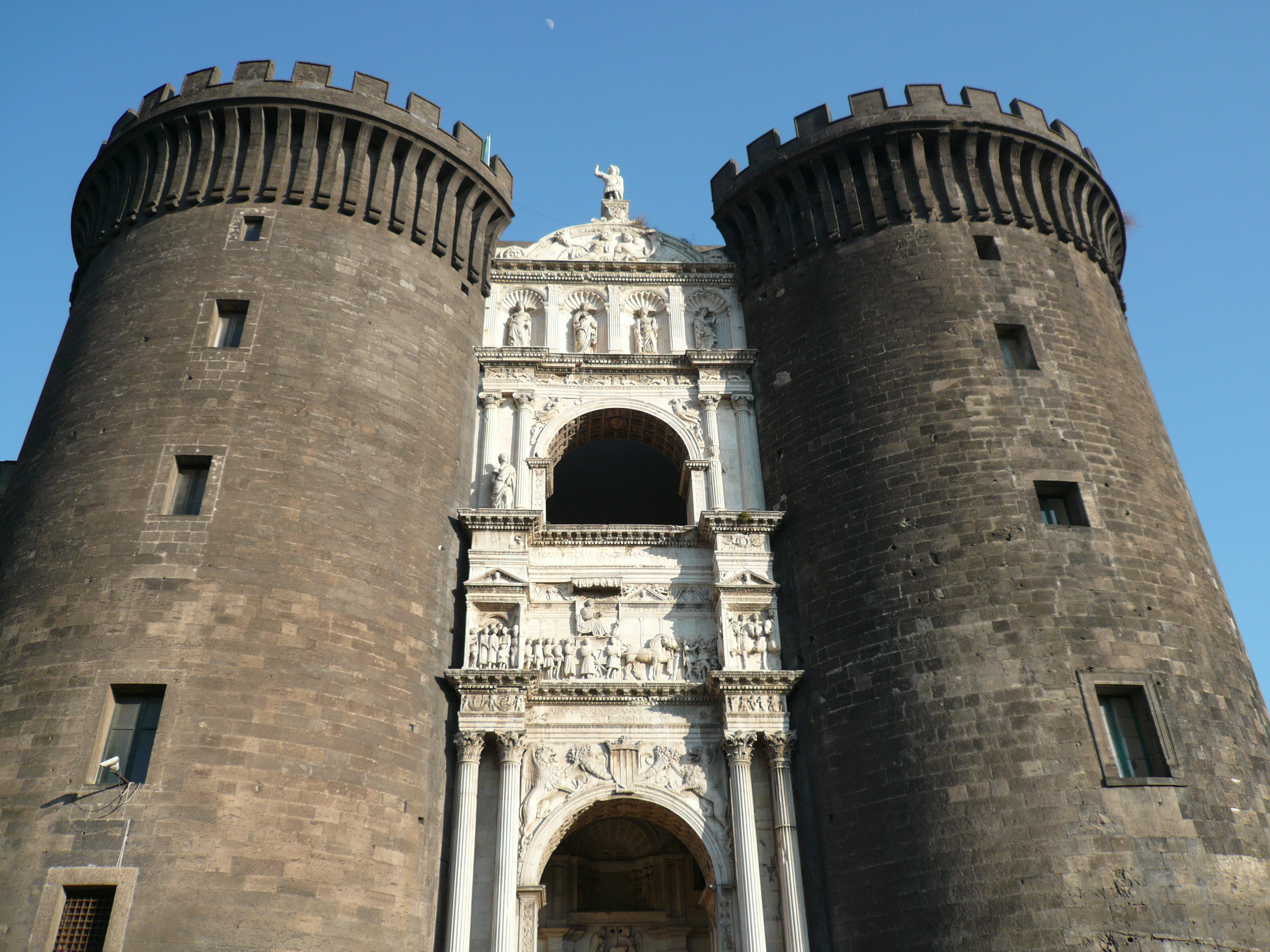 Arco Trionfale tra le Torri di Mezzo e di Guardia di Castel Nuovo Autore foto: Roberto De Martino